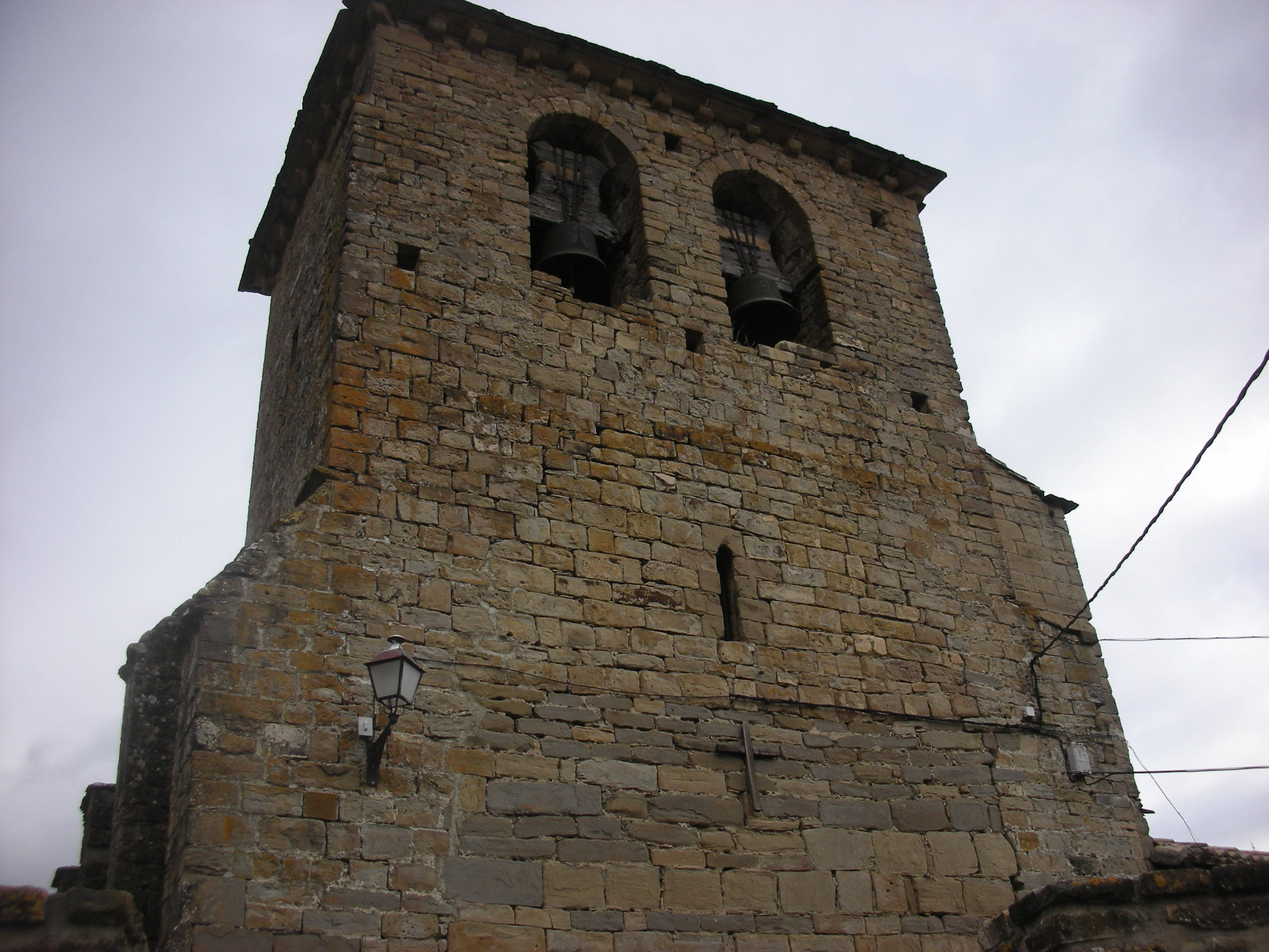 Torre de la iglesia de la Purificación, en Indurain (Navarra)